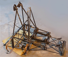 Силовая ферма вертолёта "Беркут"